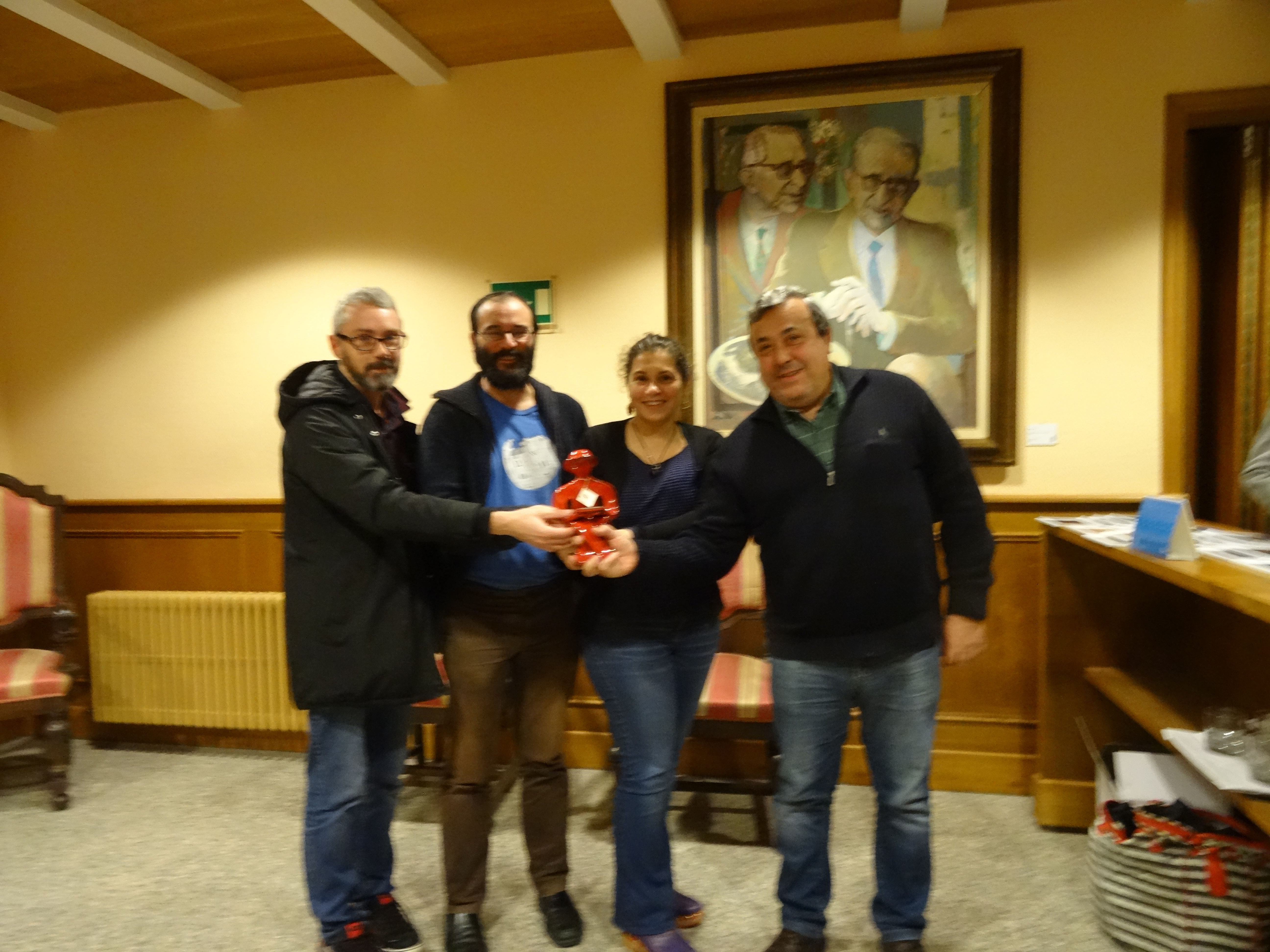 Premio Rosalía de Castro de Lingua para a Galipedia.